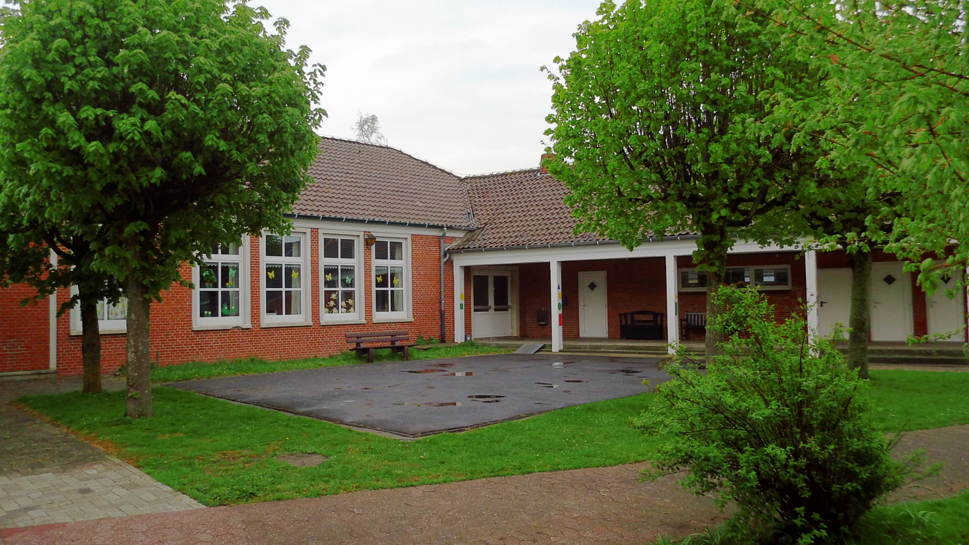 Ehemalige Manslagter Schule, jetzt AWO-Kindergarten, Manslagt, Gemeinde Krummhörn, Niedersachsen, Deutschland